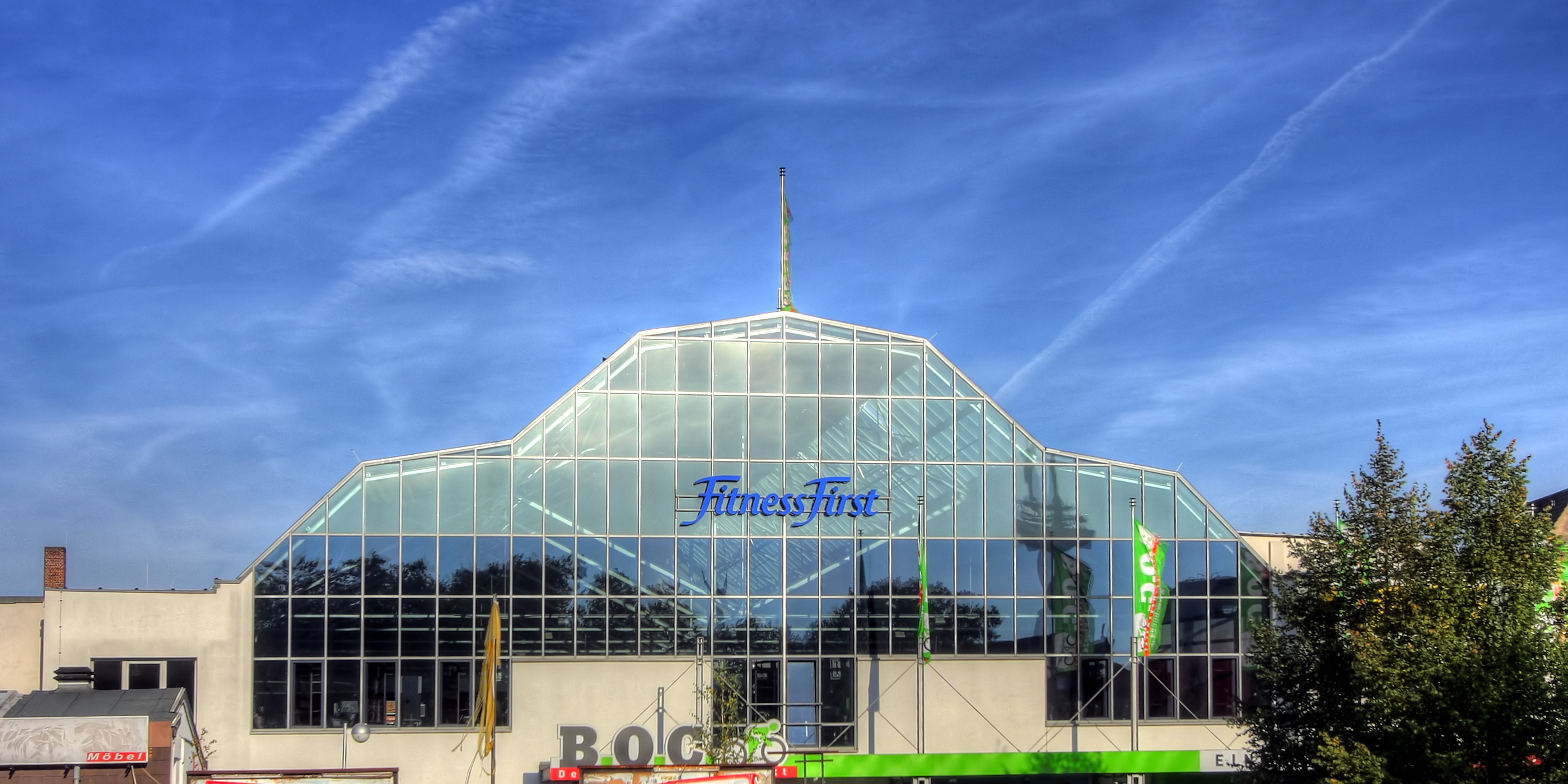 Rheinlandhalle in Köln-Ehrenfeld. In der 1. Etage befindet sich ein Fitness First-Studio